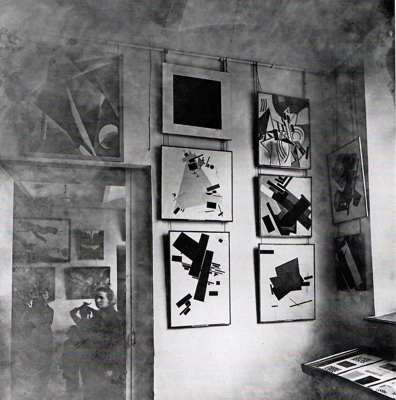 Опытная комплексная экспозиция искусства эпохи капитализма в Государственной Третьяковской галерее. Ноябрь 1931 - февраль 1932. Отпечаток фотографии находится в Научно-исследовательском отделе кинофотоматериалов Государственной Третьяковской галереи.